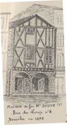 Maison à colombage avec une boutique-atelier au rez-de-chaussée du temps des Lacroix de 1740 à la mort de Jeanne Lacroix (vers 1820), héritière de Noël.